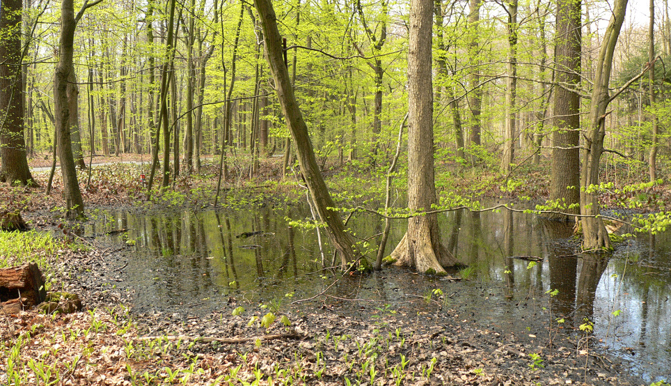 Wasserstelle in Eilenriede im Frühjahr